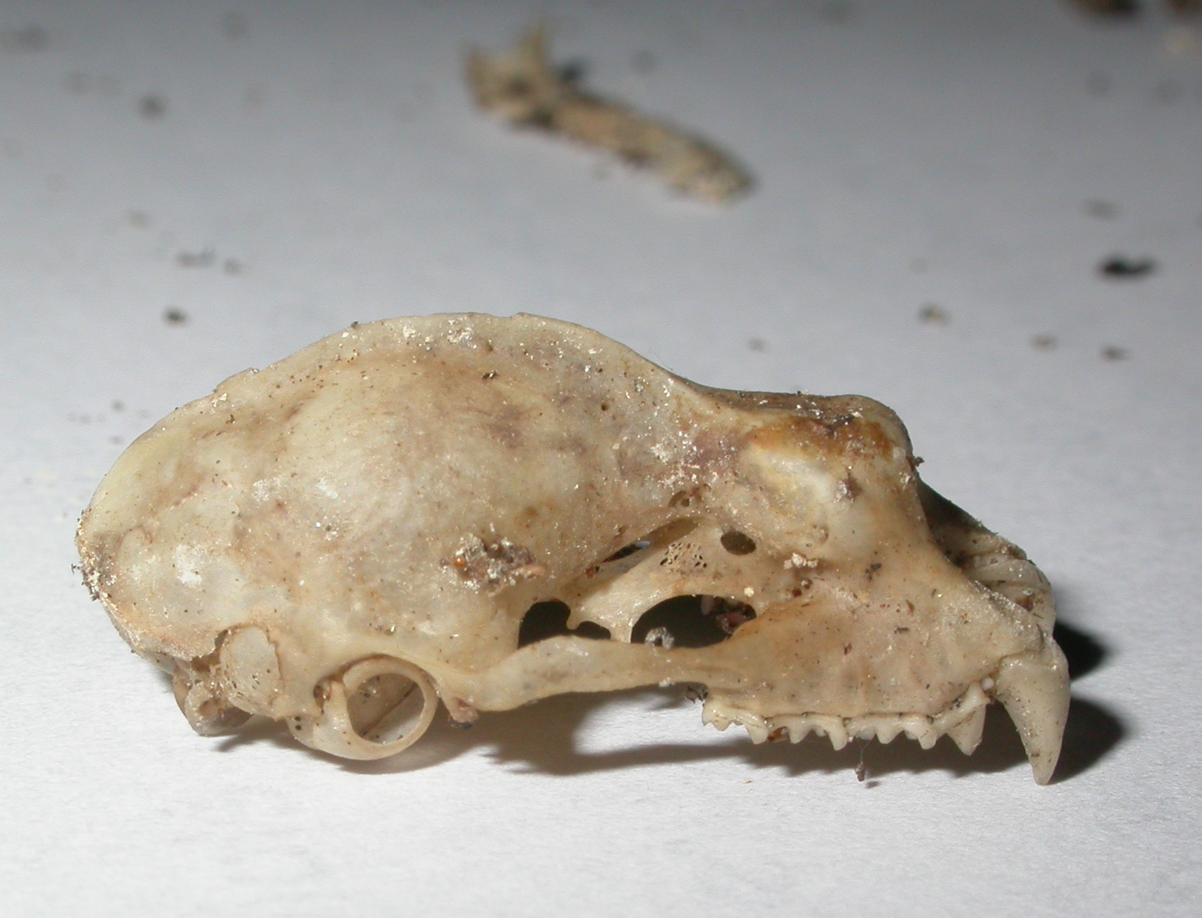 Rhinolophus ferrumequinum skull